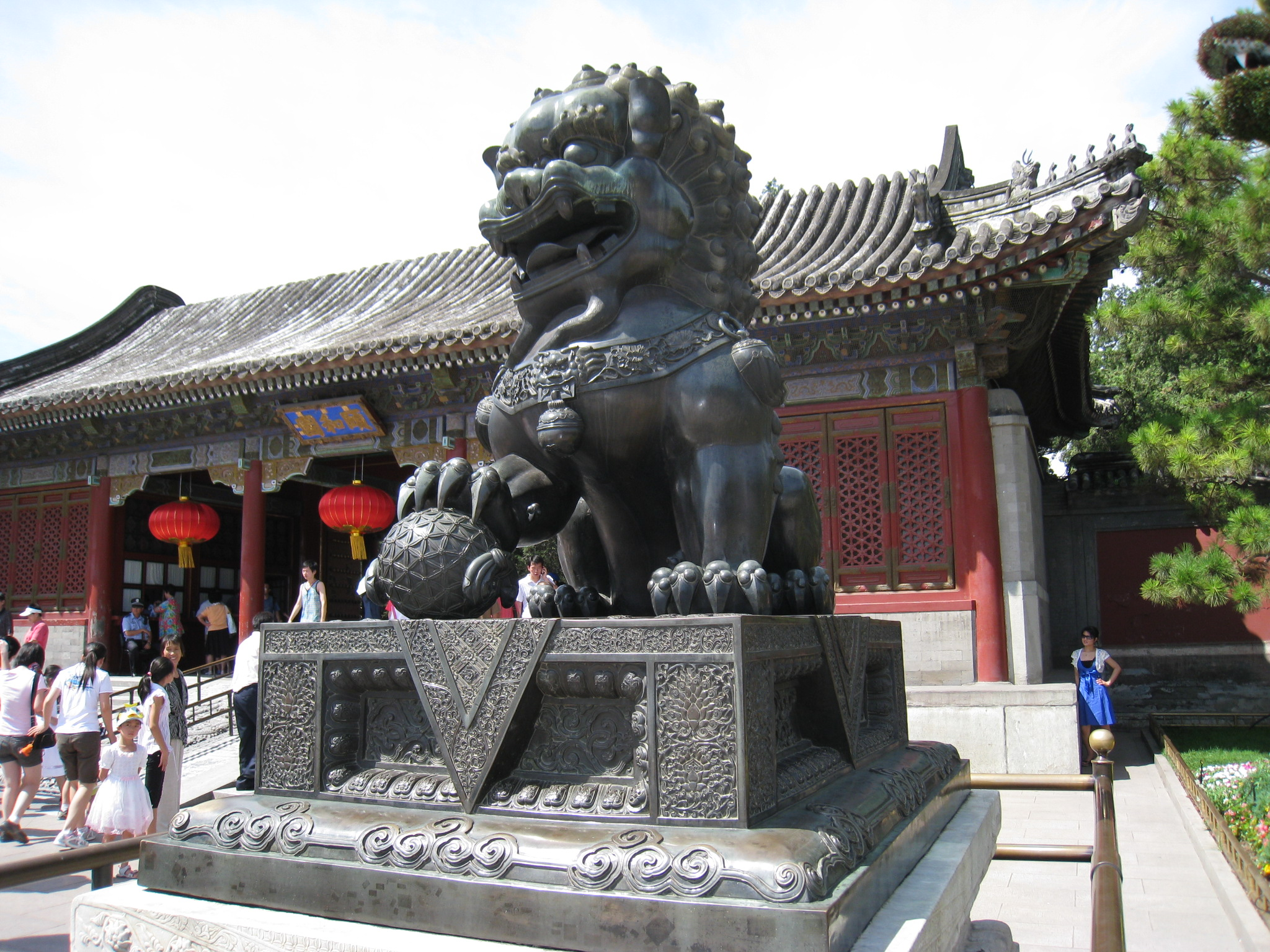 中文（中国大陆）: 铜狮子，摄于颐和园